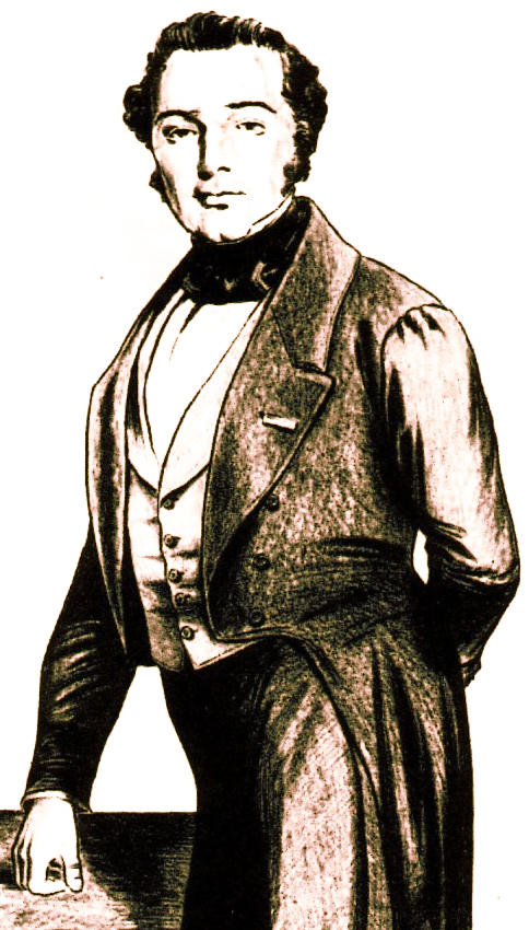 Gravure ancienne extraite de la biographie de Jean Baptiste Masui réalisée en 1861